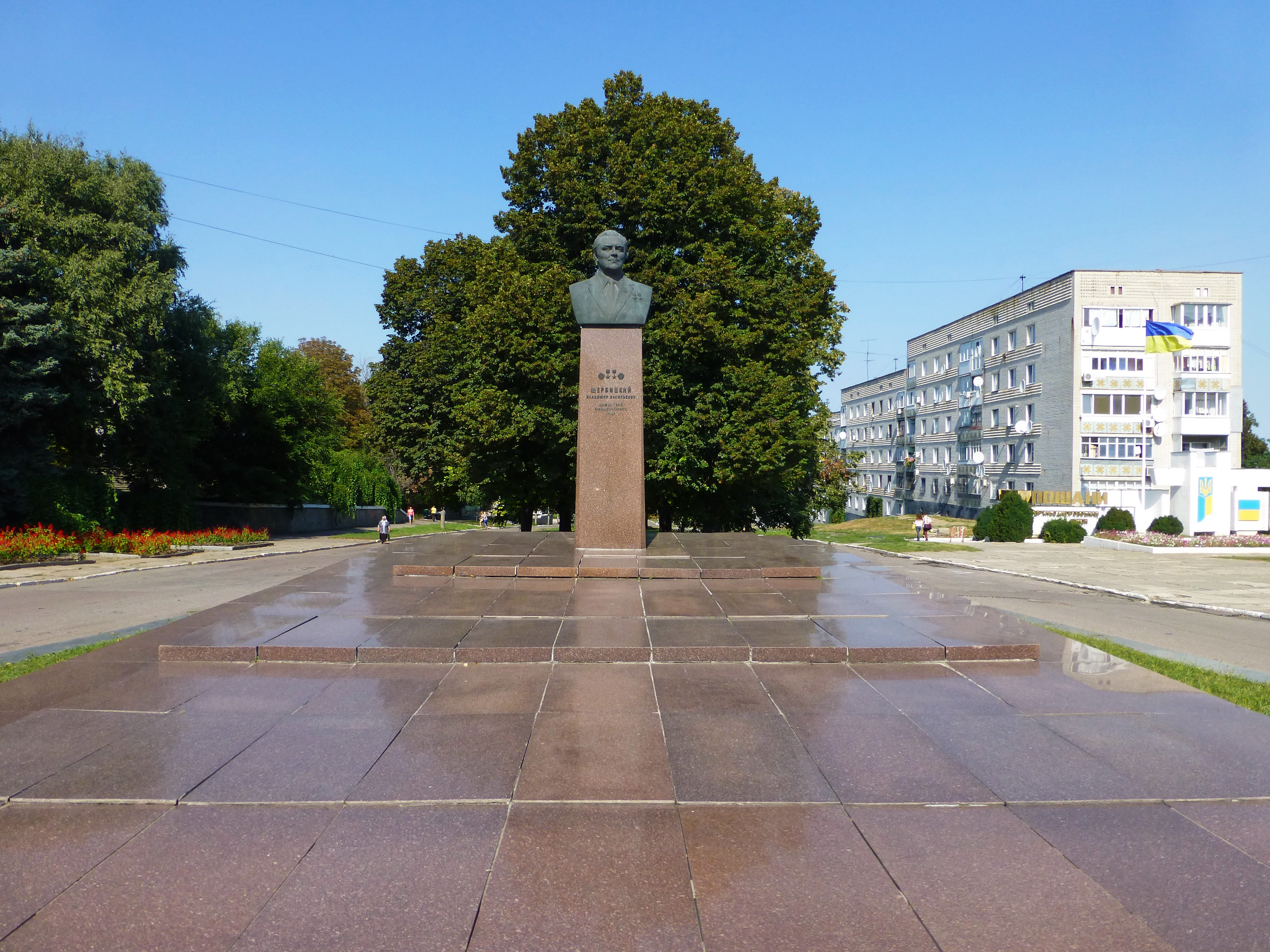 Бюст двічі Герою Соціалістичної Праці В.В.Щербицькому, Верхньодніпровськ, пр. ім. Леніна, на бульварі